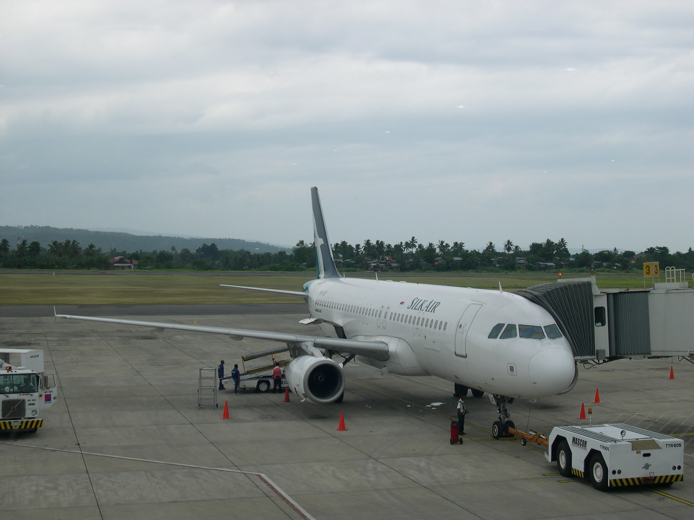 SilkAir Airbus A320 op Davao International Airport klaar voor vertrek naar Cebu City op 22 maart 2006 Foto gemaakt door Magalhães